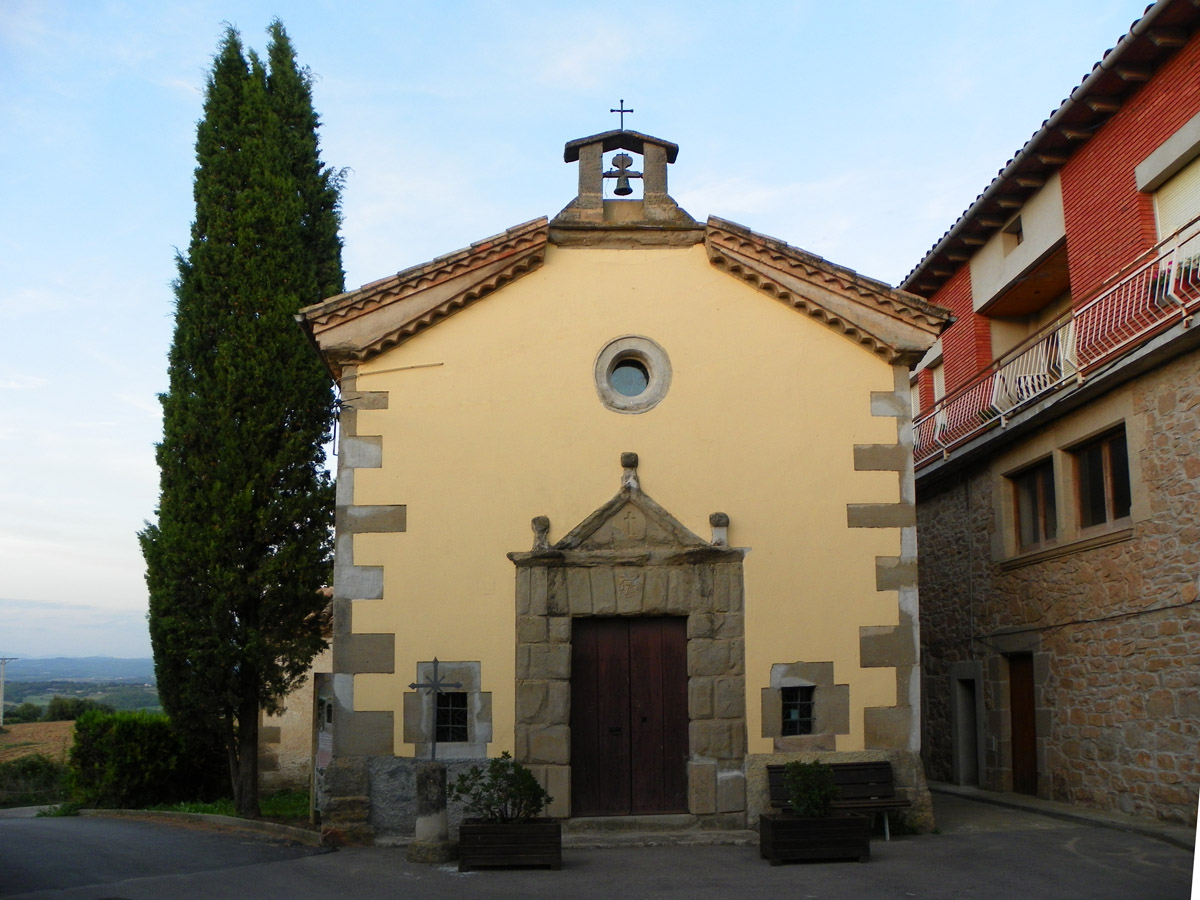 Ermita de la Magdalena de Sant Feliu Sasserra (provincia de Barcelona).